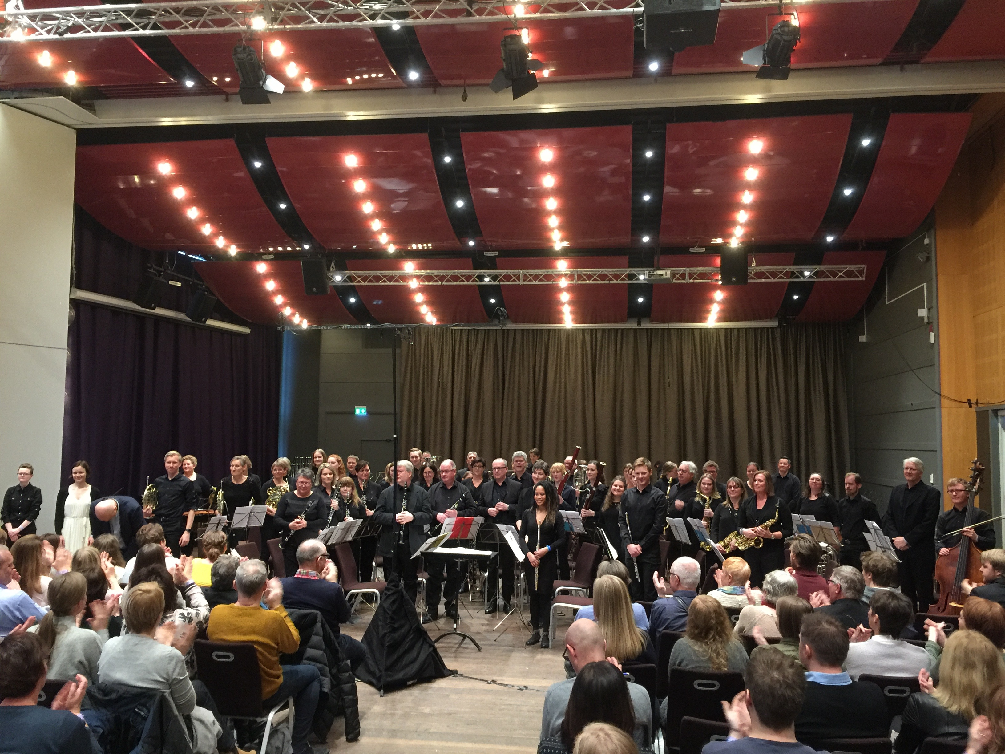 NM janitsjar 2017